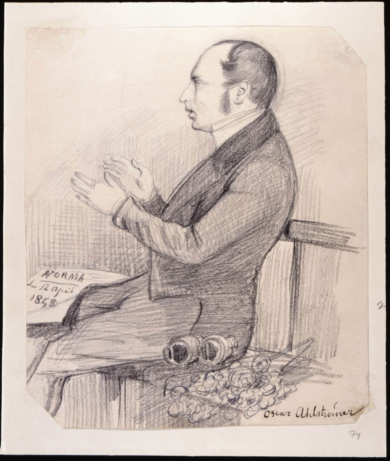 Depicted person: Oscar Alströmer, Landshövding, Politiker, Sverige (SE) (1811-1888)